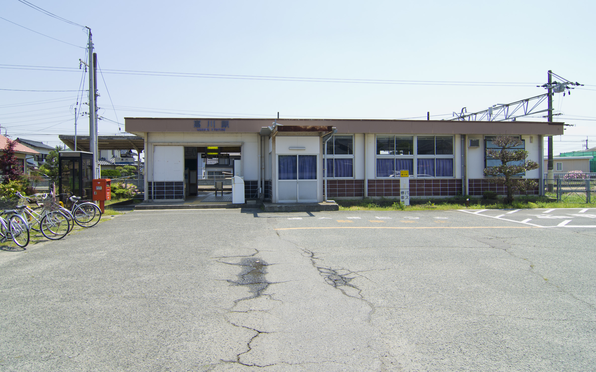 西日本旅客鉄道株式会社山陽本線嘉川駅